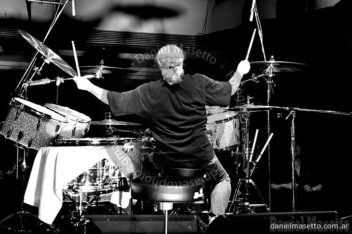 Clínica de Batería en ND ATENEO, Ciudad de Buenos Aires junto al baterista Sergio Masciotra y el grupo La Carga